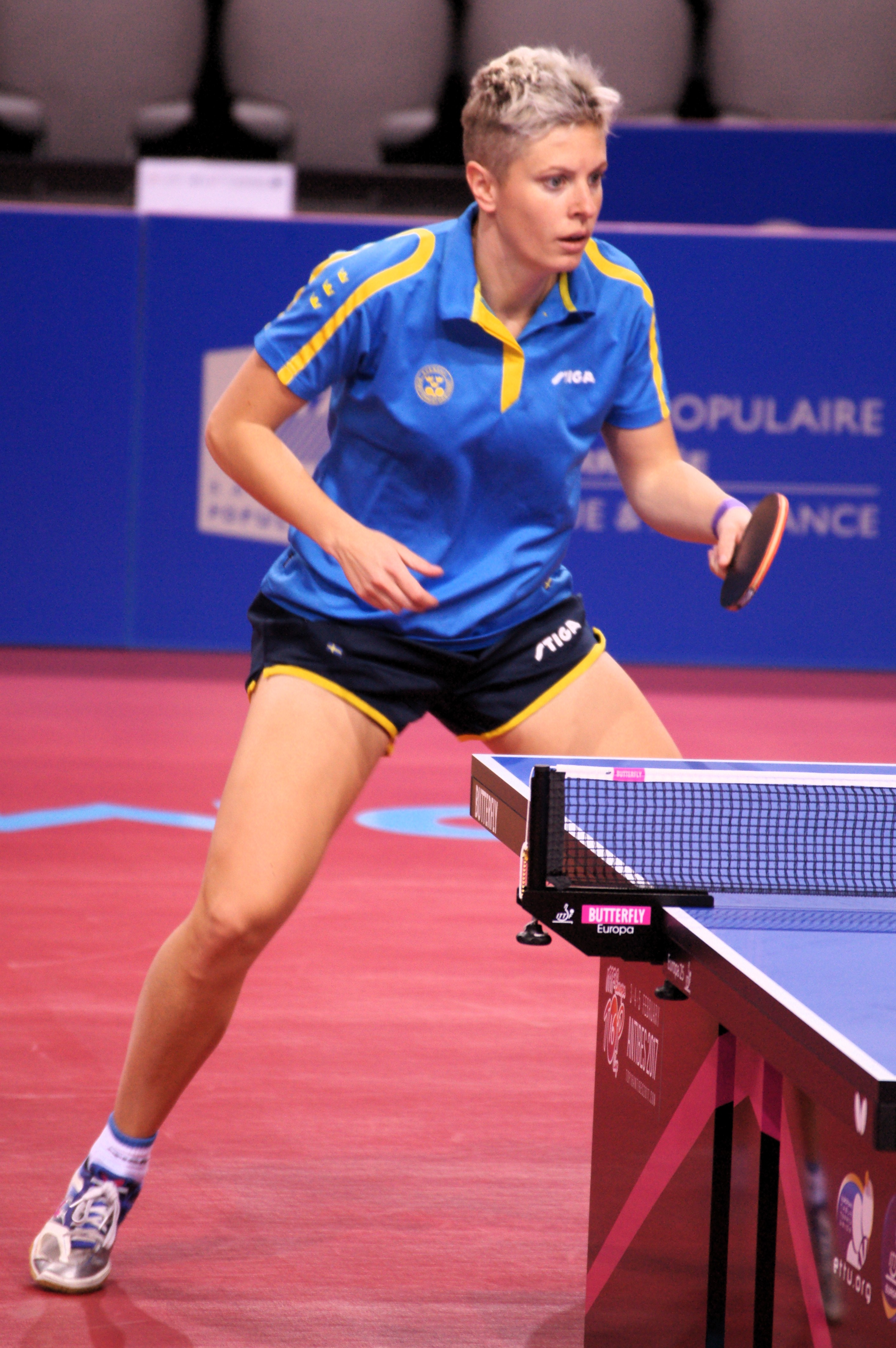 Matilda Ekholm, Top 16 Antibes 2017